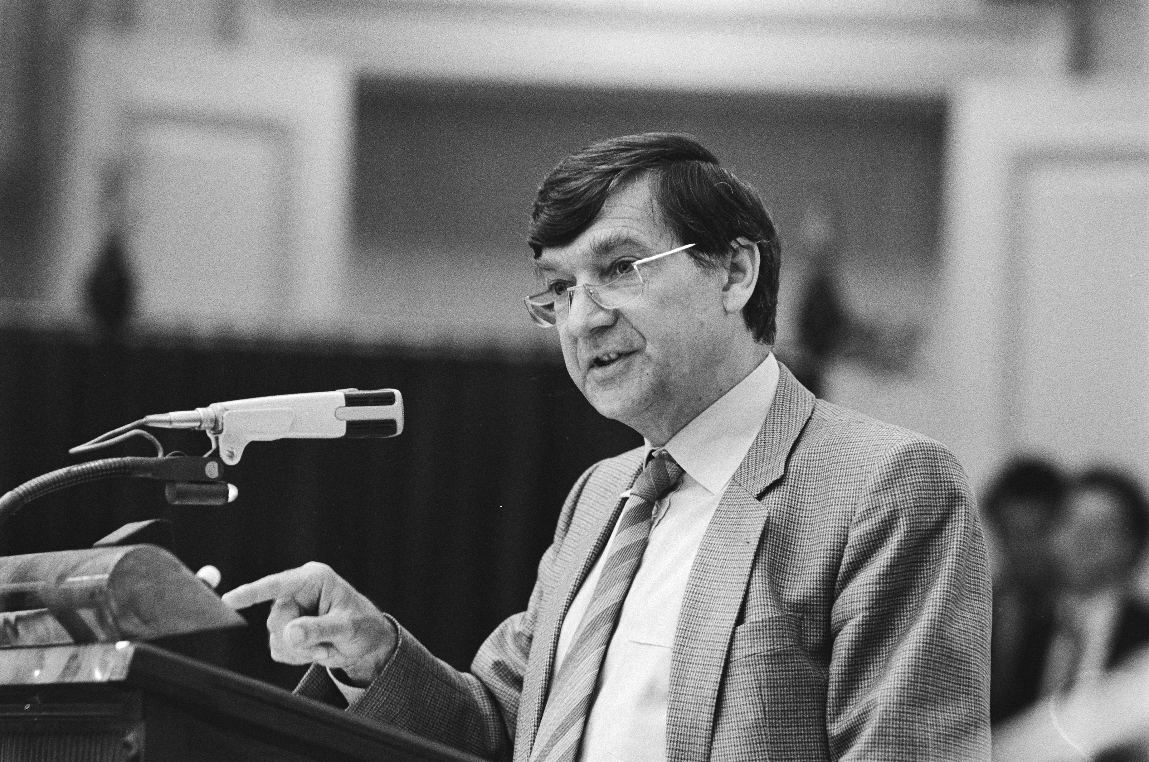 Collectie / Archief : Fotocollectie Anefo Reportage / Serie : Debat in de Tweede Kamer over het aanwijzen van Woensdrecht voor de plaatsing van kruisraketten Beschrijving : Dhr. Joep de Boer (CDA) aan het woord Datum : 30 juni 1983 Locatie : Den Haag, Zuid-Holland Trefwoorden : kruisraketten, parlementaire debatten, parlementariërs Persoonsnaam : Boer, Joep de Instellingsnaam : Tweede Kamer Fotograaf : Croes, Rob C. / Anefo Auteursrechthebbende : Nationaal Archief Materiaalsoort : Negatief (zwart/wit) Nummer archiefinventaris : bekijk toegang 2.24.01.05 Bestanddeelnummer : 932-6380